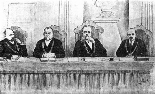 Состав суда над Бейлисом. Второй справа - председатель Киевского Окружного Суда Ф.А.Болдырев Composition of the trial of Beilis. Second right - the chairman of the Kiev District Court F.A. Boldyrev